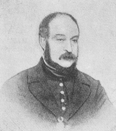 Moses Judah Hays (1799-1861)Directeur du Service de police de Montréal de 1854 à 1861